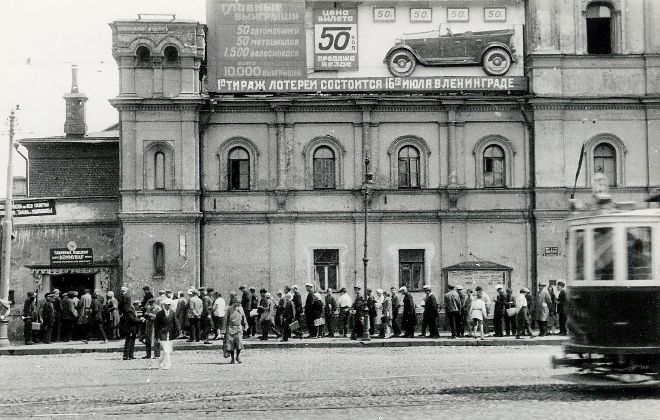 Рекламный плакат розыгрыша лотереи 16 июля 1930 года на здании Страстного монастыря, Москва